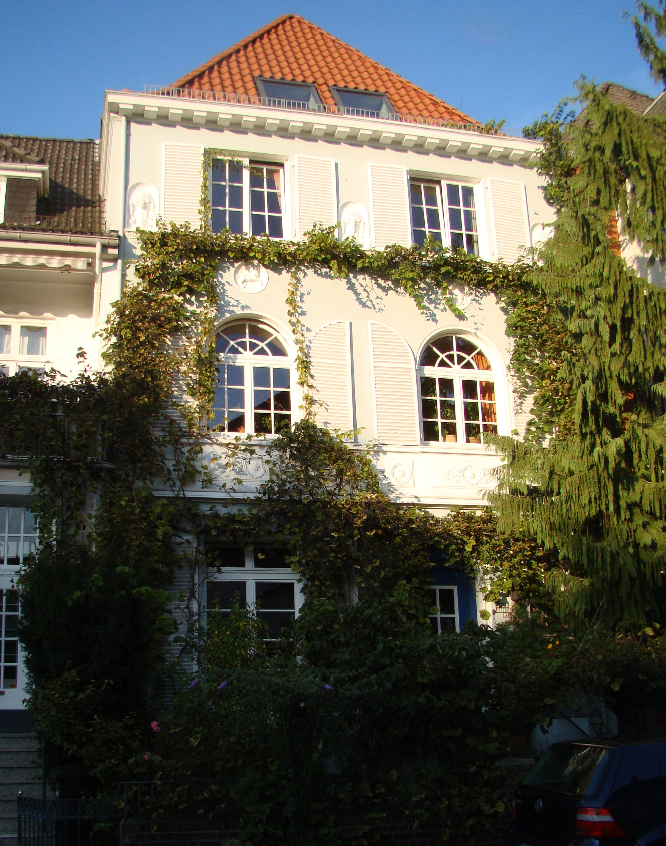 Haus Dr. Spieß in Bremen, Franziusstraße 44.Das abgebildete Objekt ist ein geschütztes Kulturdenkmal in der Freien Hansestadt Bremen, mit der Nr. 0416 beim Landesamt für Denkmalpflege registriert.